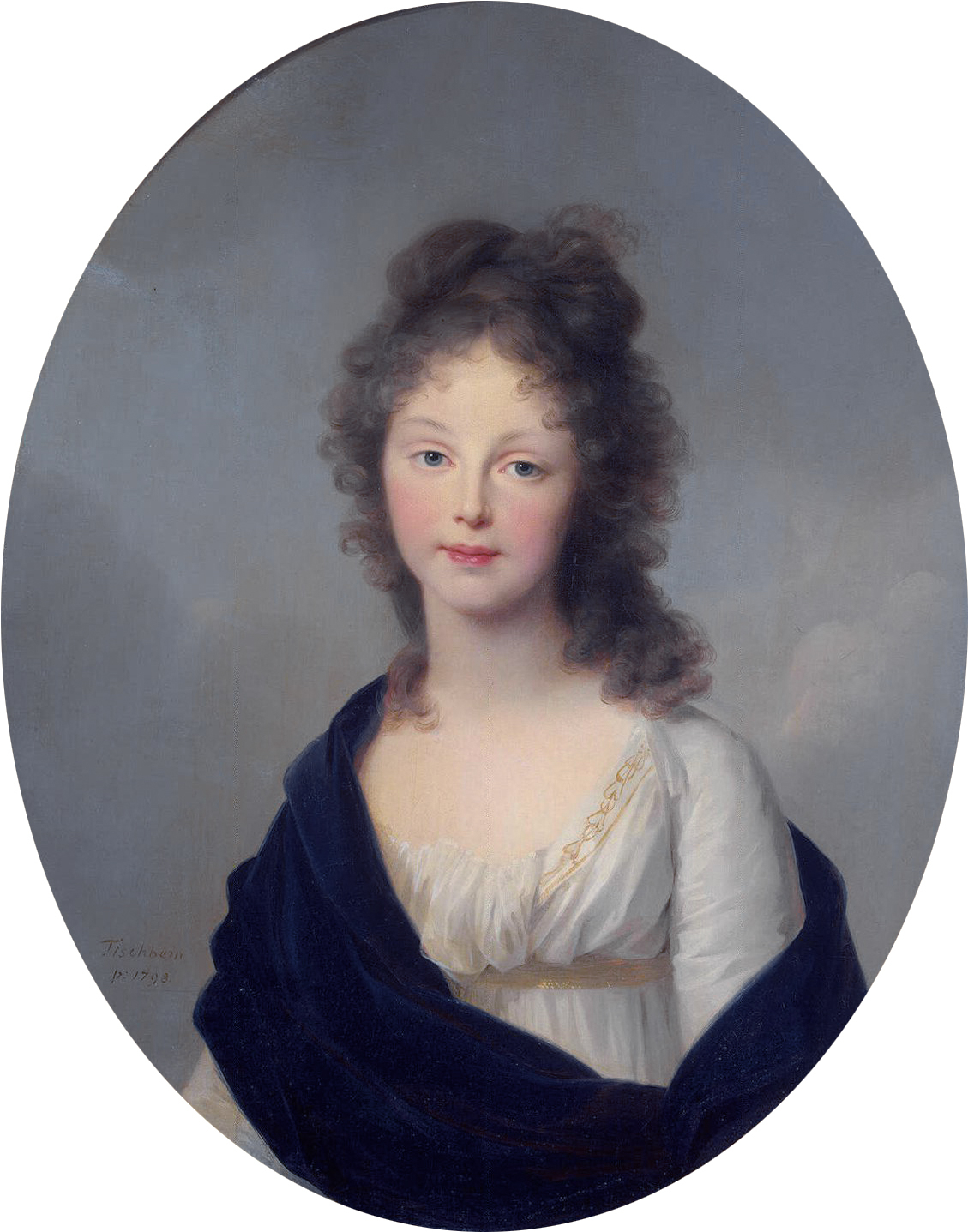 Porträt der Louise von Preußen, Gemahlin Friedrich Wilhelm III.